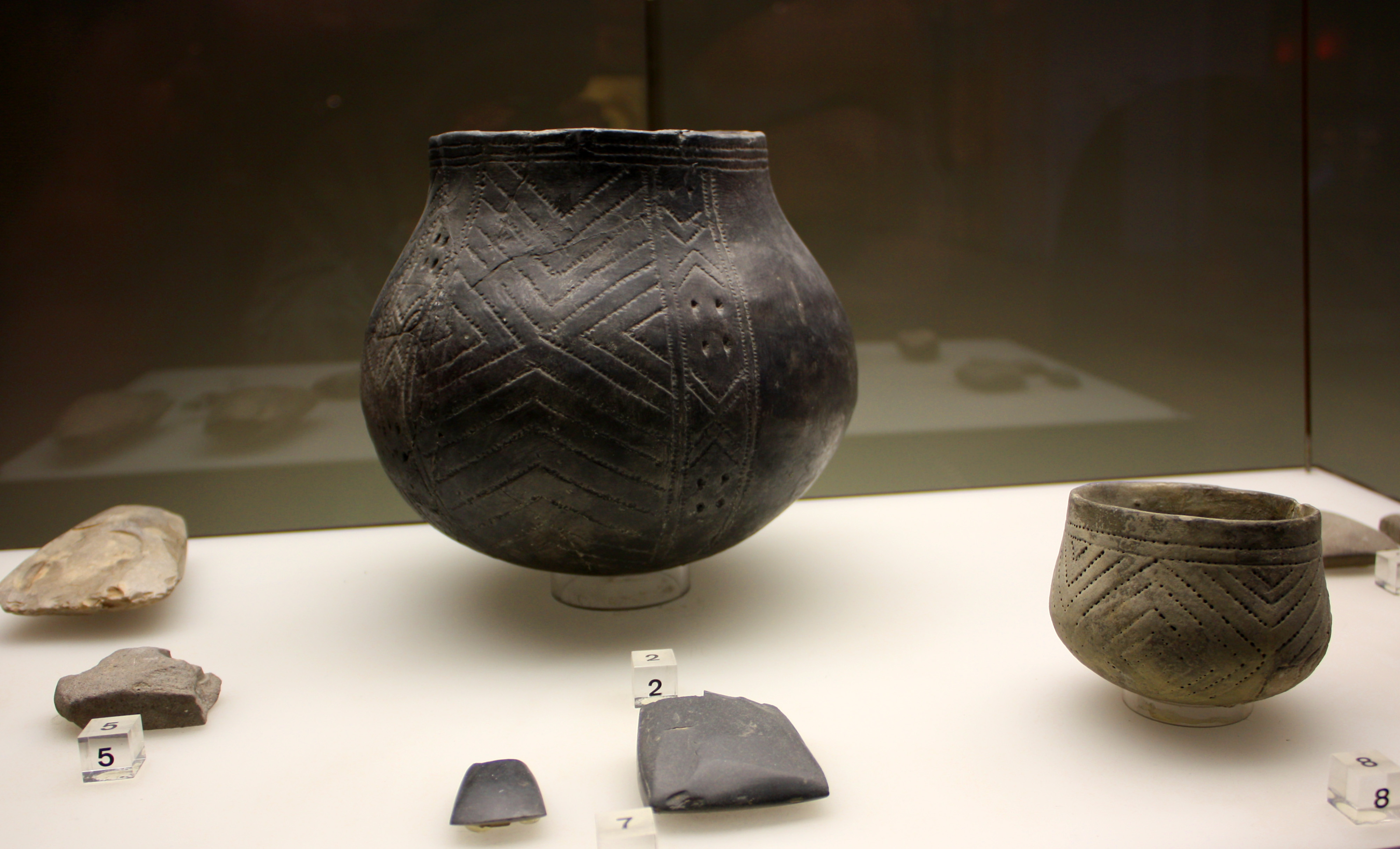 Köln-Lindenthal, steinzeitliche Funde. Römisch-Germanisches Museum (RGM), Köln